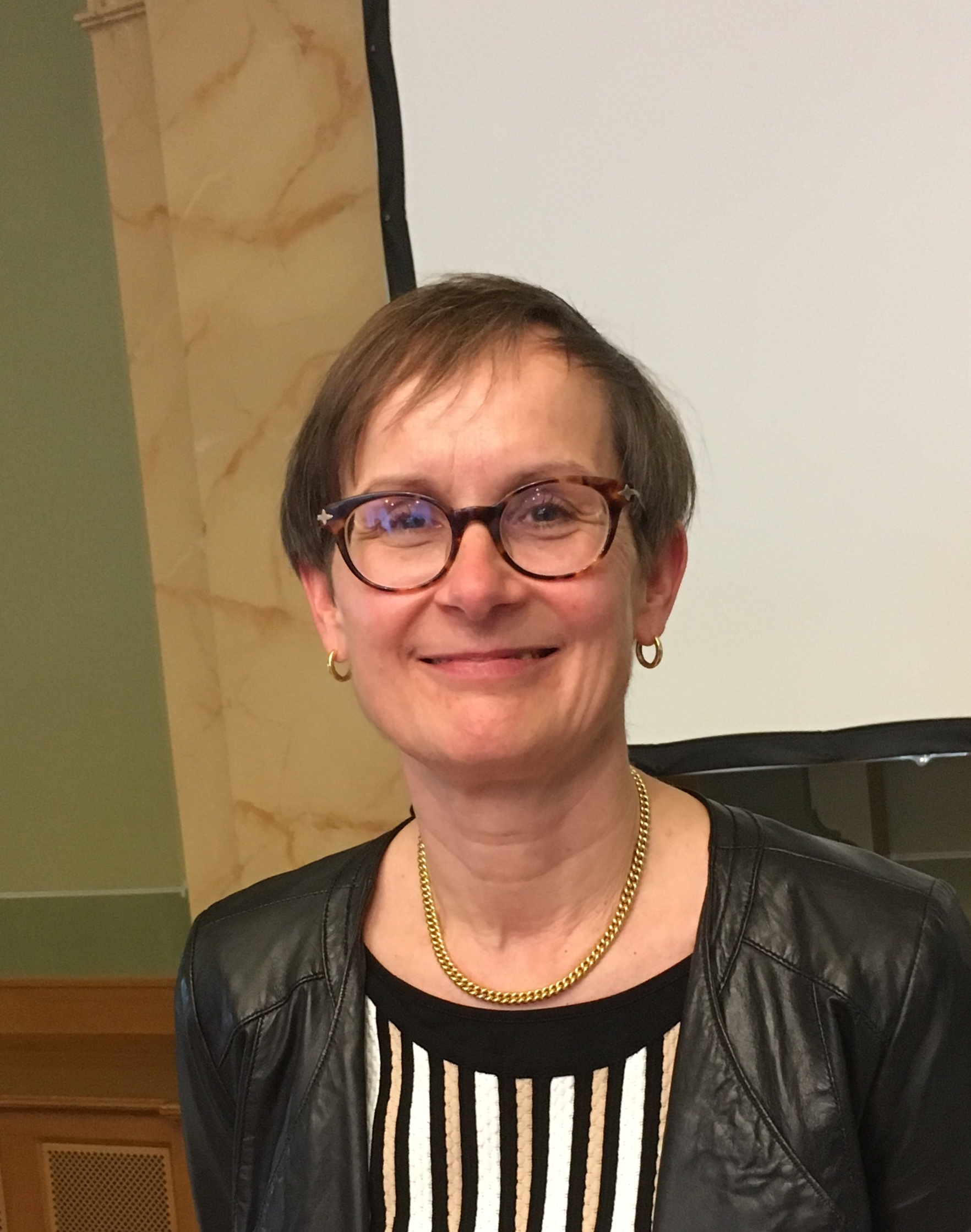 an der Tagung "Bildungslandschaft Quo Vadis" in der Psychiatrischen Universitätsklinik Zürich